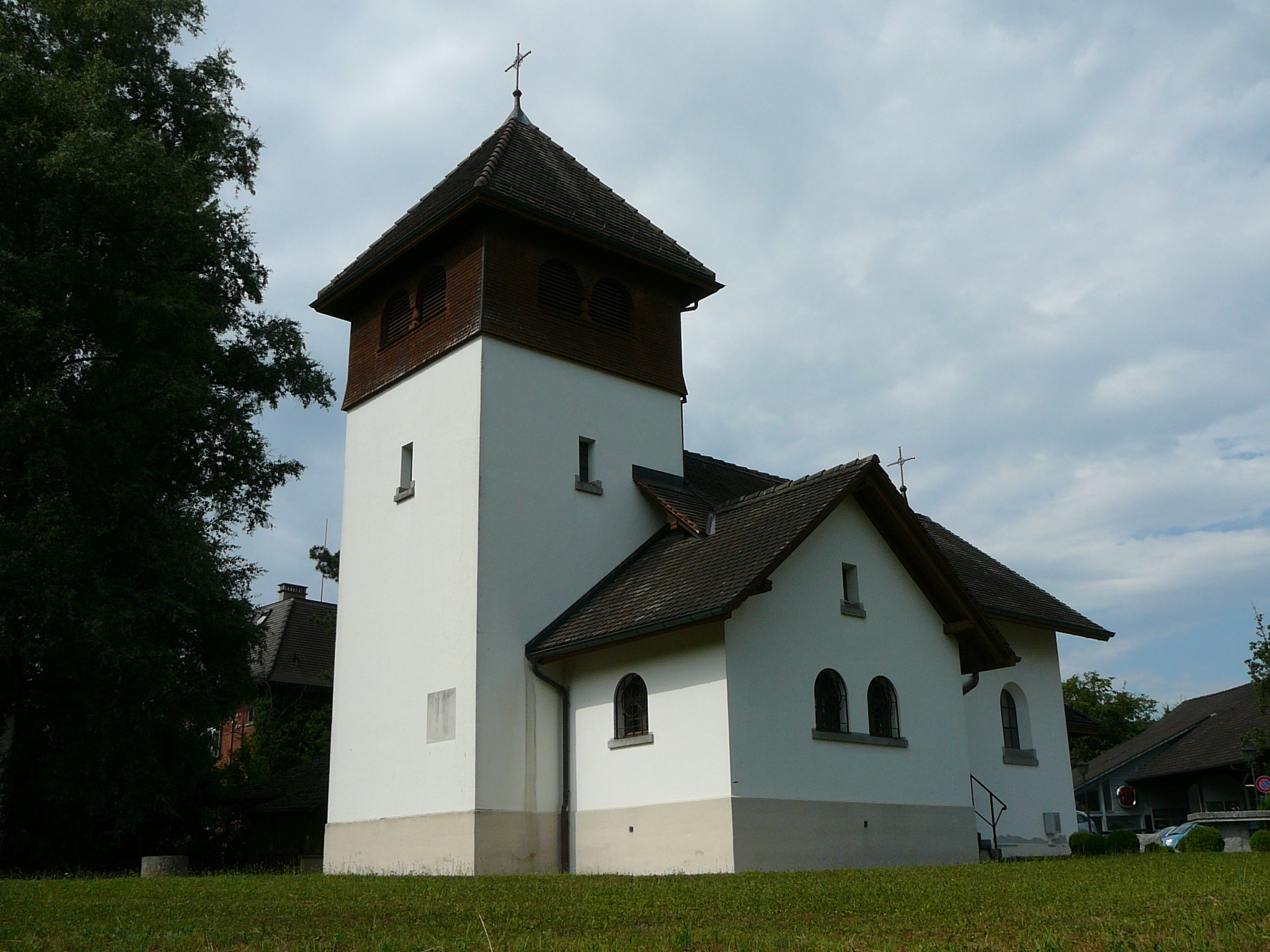 Römisch-katholische Kapelle St. Petrus Embrach Süd